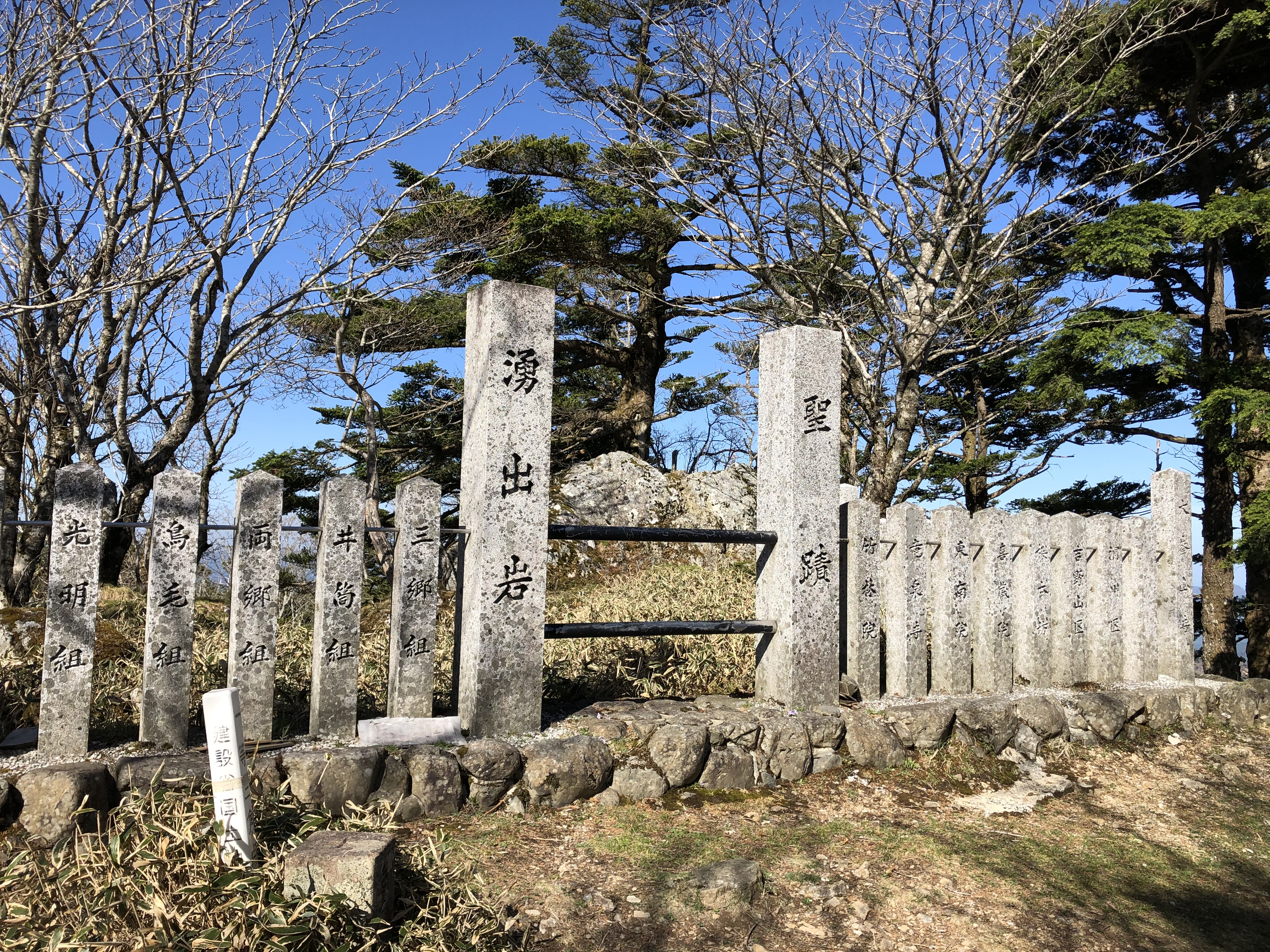 山上ヶ岳山頂、湧出岩と三角点。